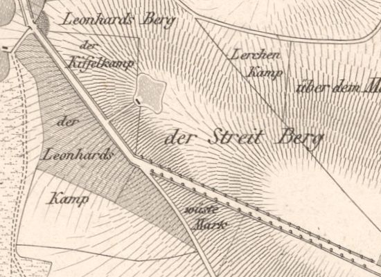 Karte des Streitbergs in Braunschweig 1835.